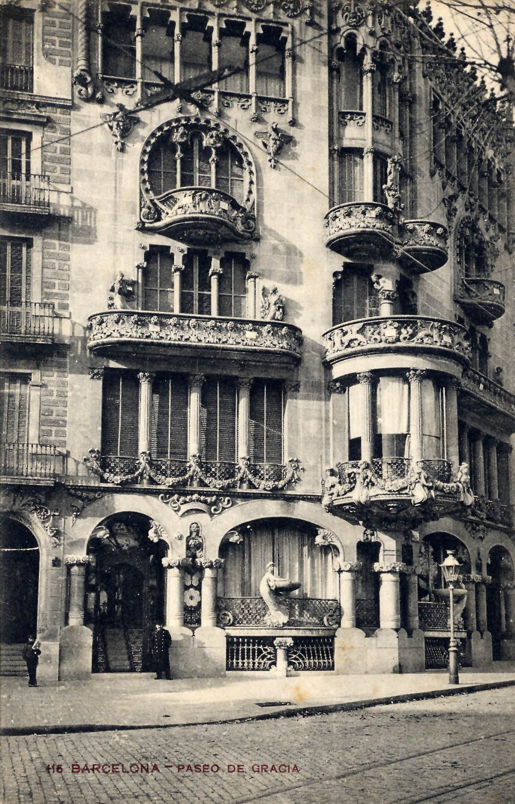 Casa Lleo Morera cap al 1903-1904. Postal de "Samsot i Missé"